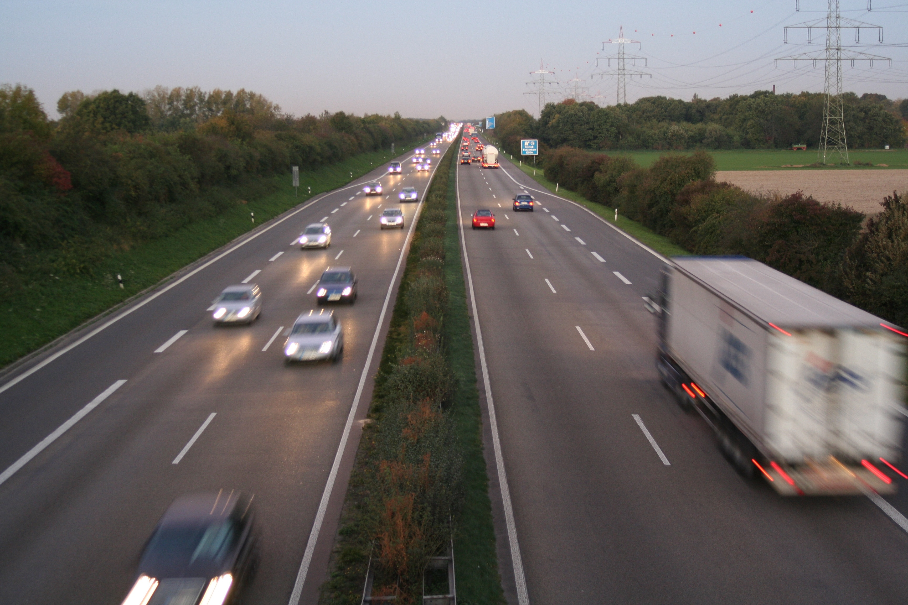 Autobahn A44 zwischen Willich (links) und Krefeld (rechts); rechts Freileitung (Bl. 2388, 220/110 kV) Sonstiges: gemeinfreie Lizenz, da die Rechte bei mir liegen.